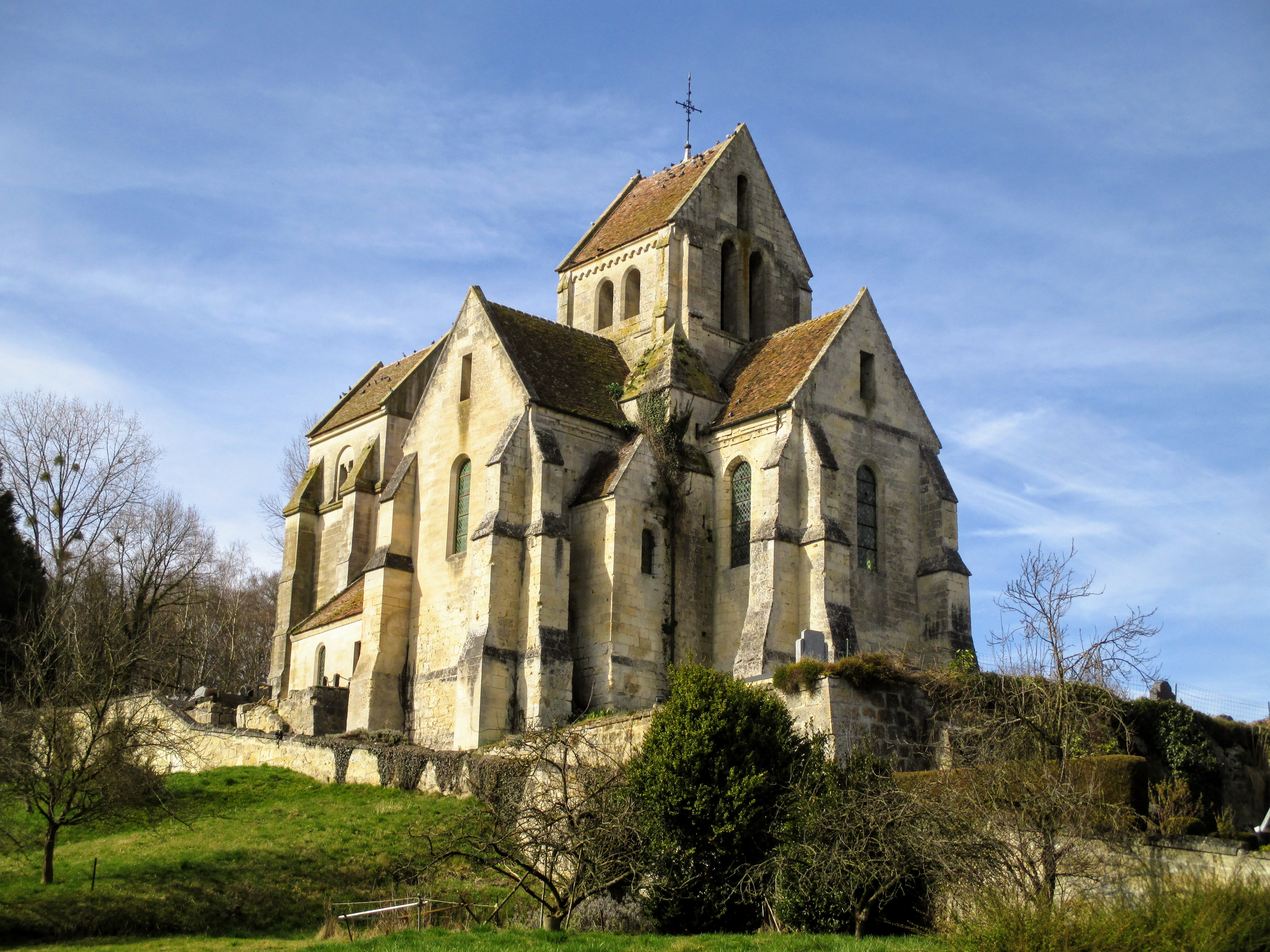 Eglise de Septvaux, mars 2017